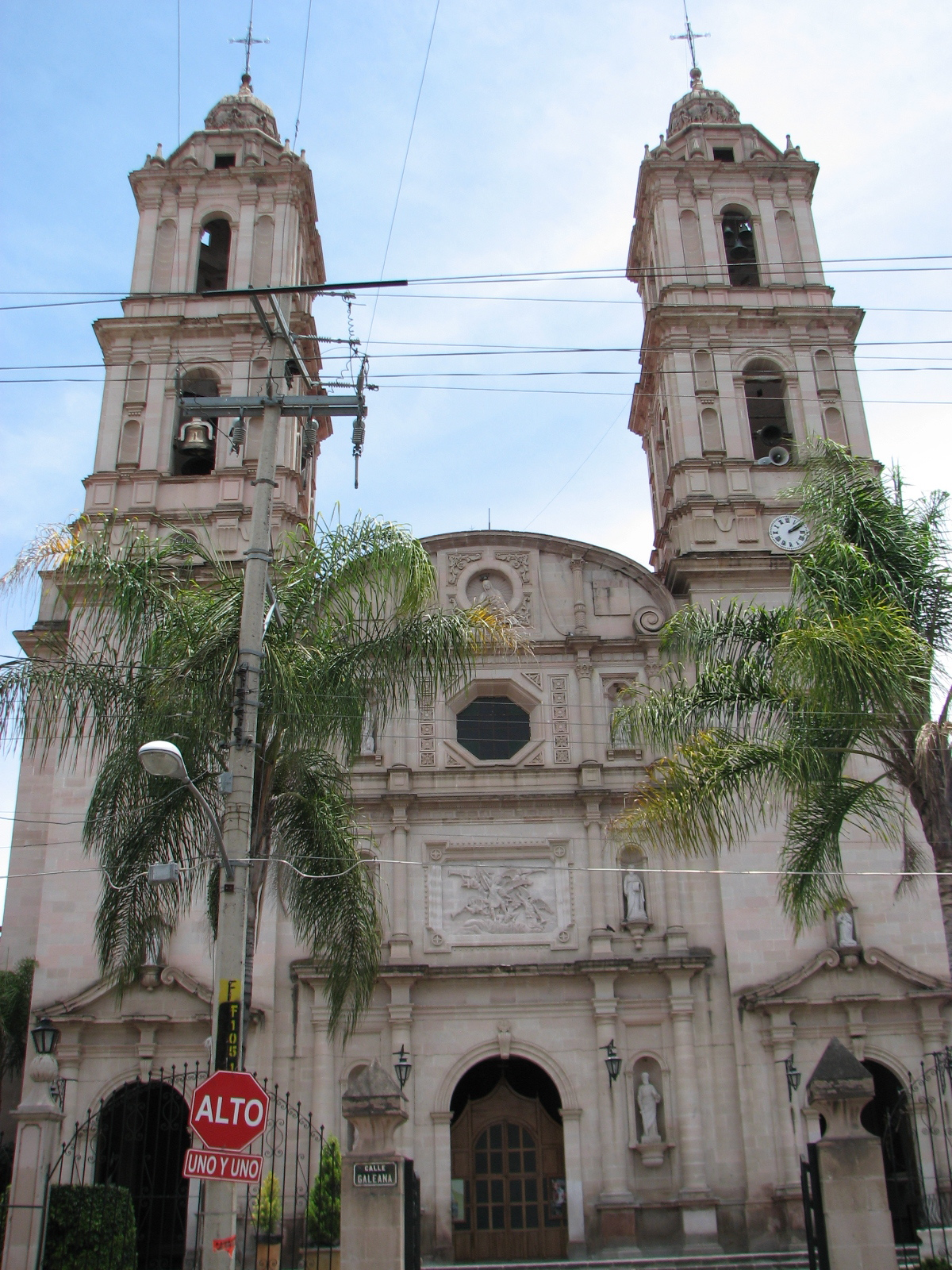 Iglesia de Yahualica